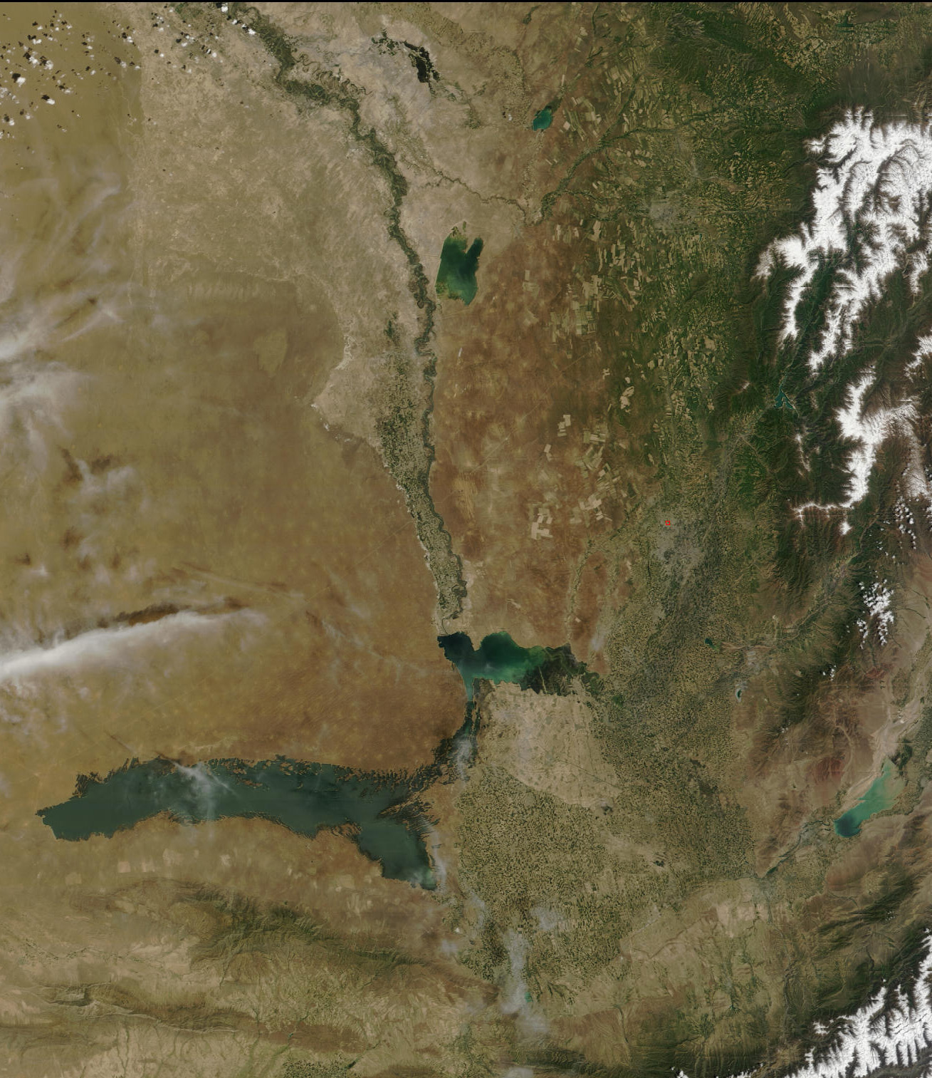 Коксарайское водохранилище сверху, Чардаринское вдхр. и Айдаркуль снизу (NASA, 13 мая 2011г.)